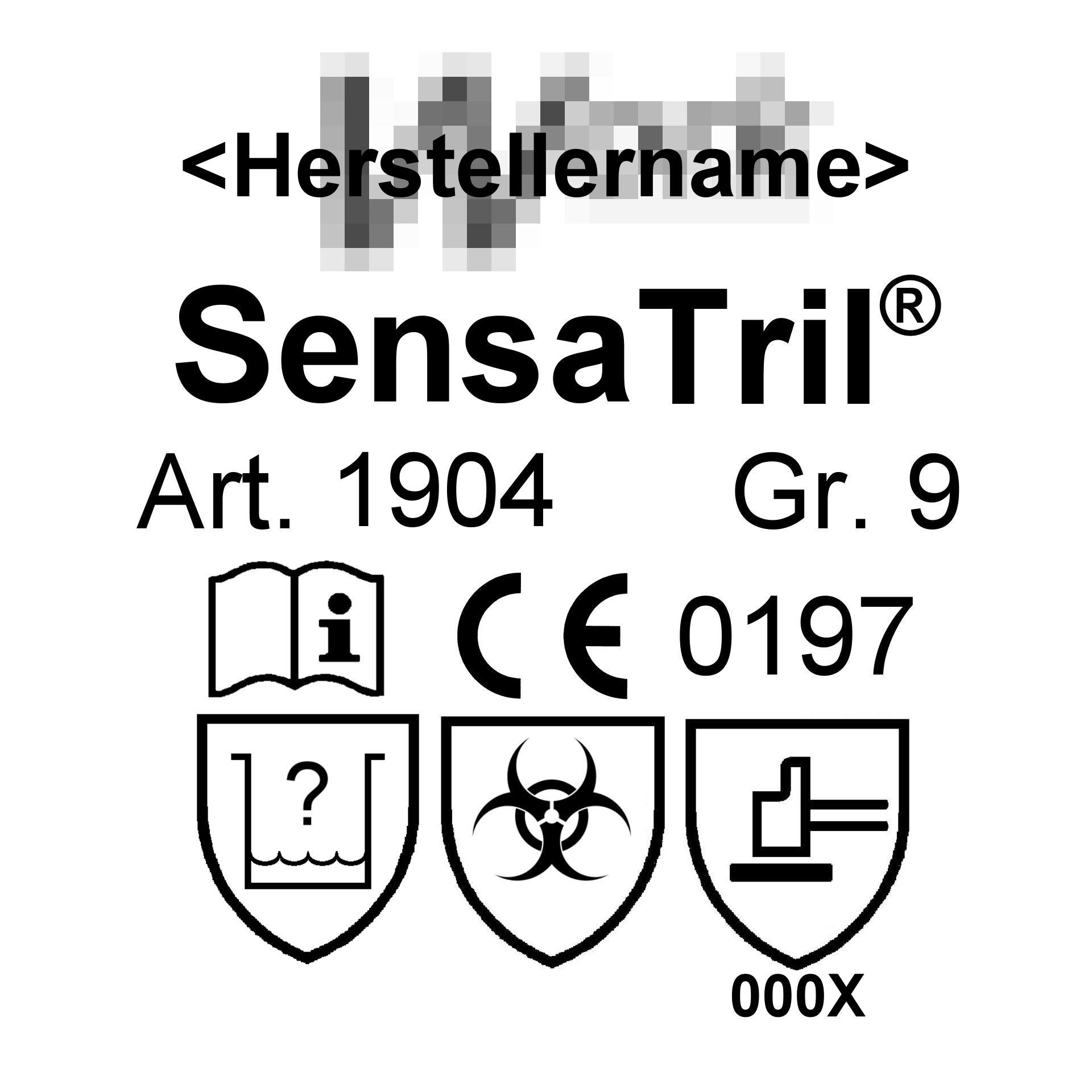 Beispielhafte Kennzeichnung eines Schutzhandschuhs der PSA-Kategorie III mit allen notwendigen Pflichtangaben Typ "einfacher Chemikalienschutz"